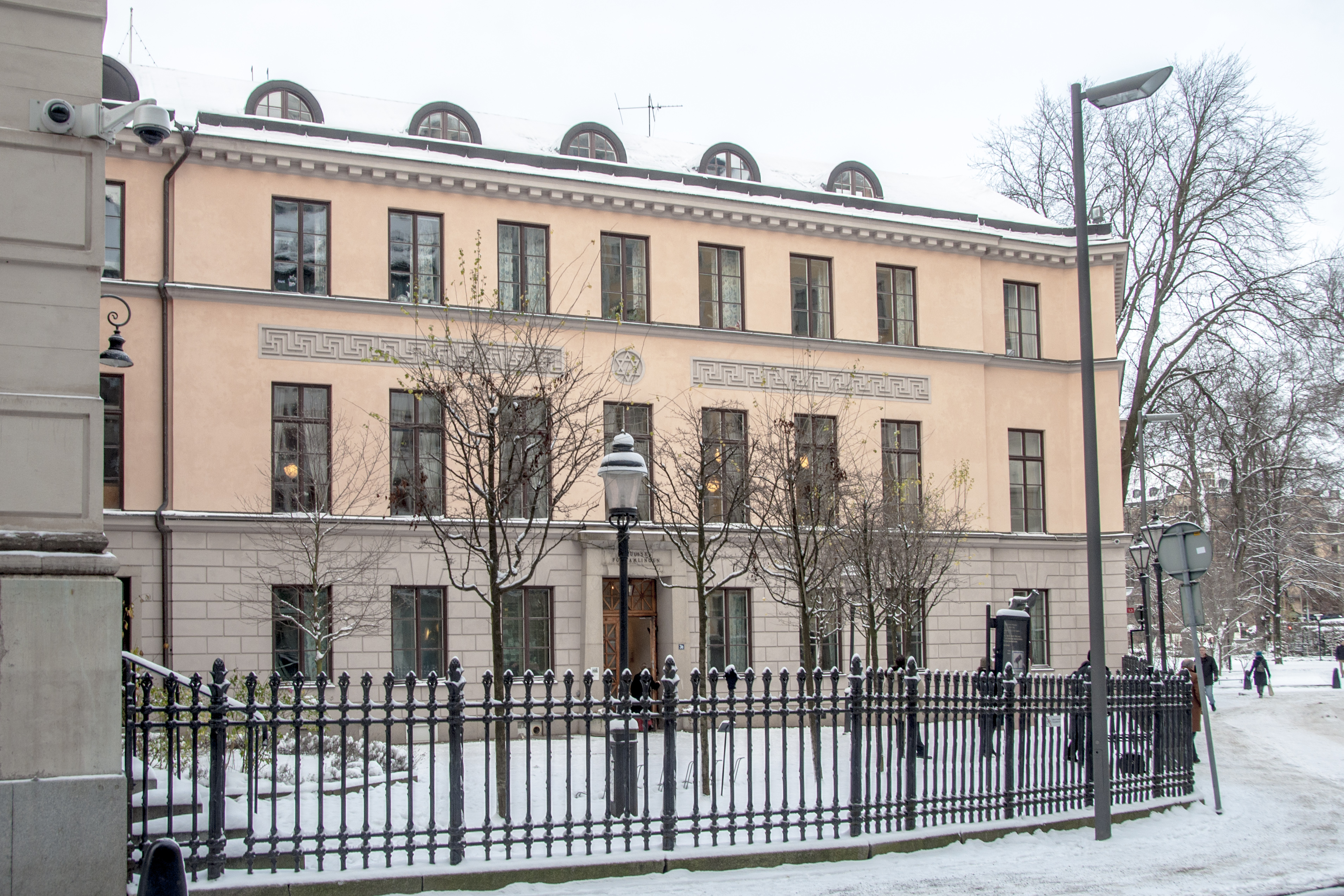 Judiska församlingens hus, Stockholm. Wahrendorffsgatan 3B, Nybyggnadsår 1926 - 1927, Erik Josephson (Arkitekt) Max Gumpel (Byggmästare) Mosaiska Församlingen (Byggherre)